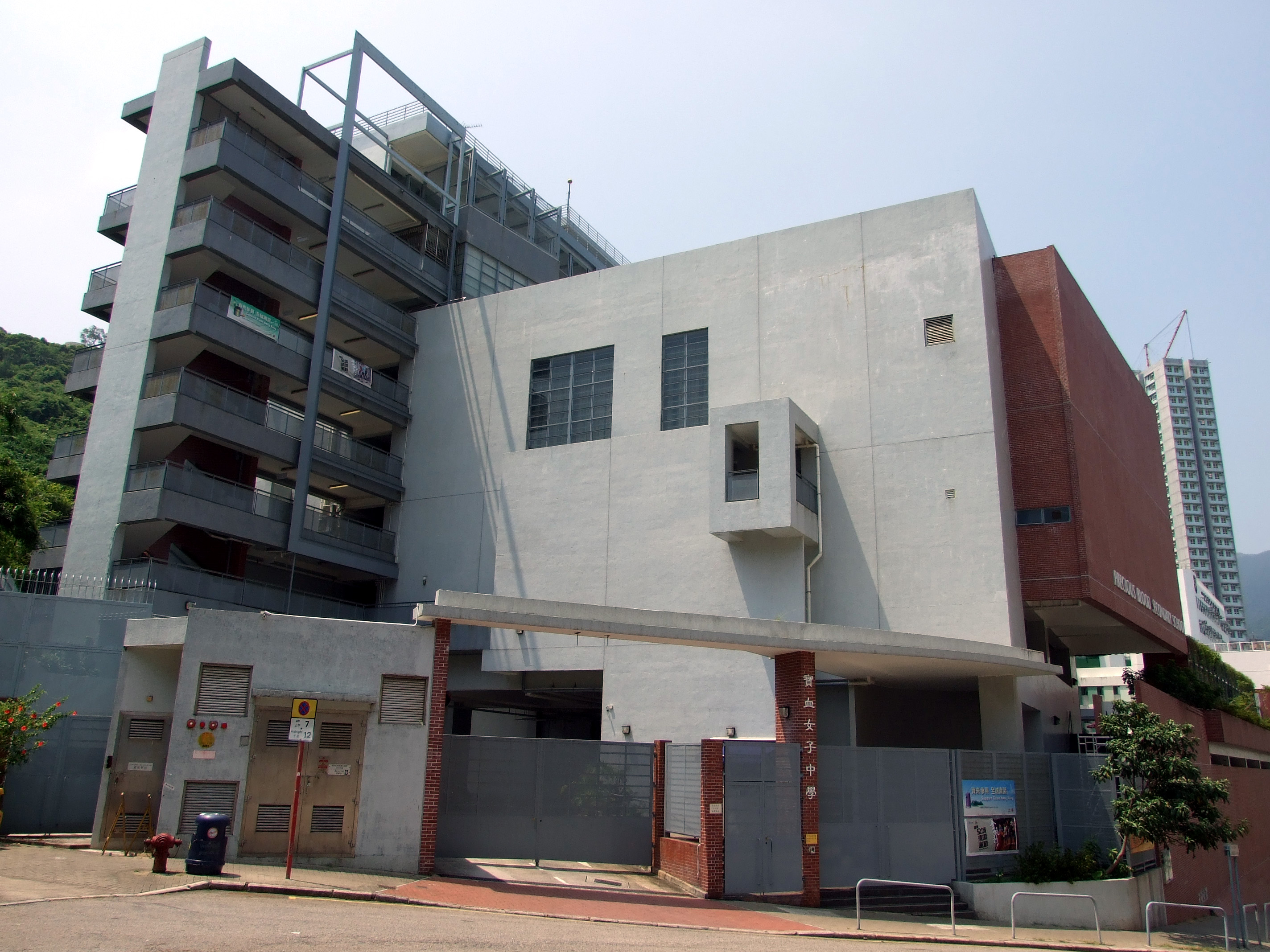 中文（香港）: 寶血女子中學